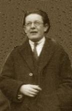 Jean Piaget (1896-1980) devant la porte de l’Institut Jean-Jacques Rousseau à Genève en 1925